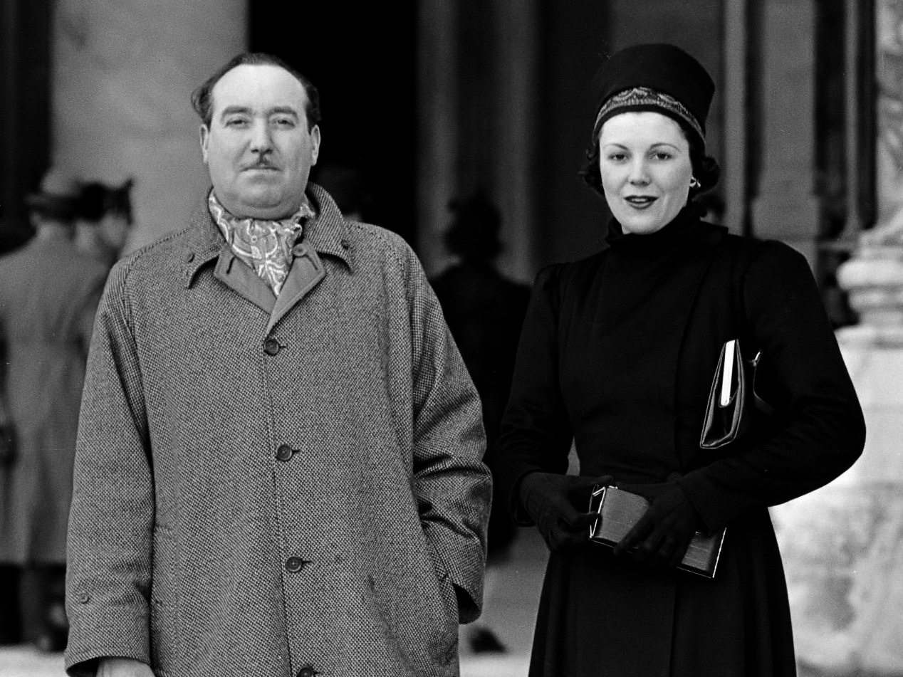 Lee Garmes en zijn vrouw voor de ingang van de Sint-Pietersbasiliek december 1937